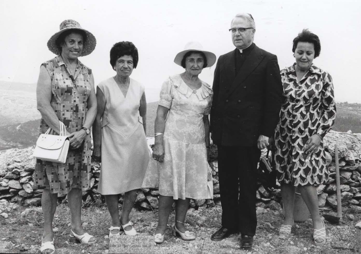 מטילדה עם דון לטו קזיני בטכס נטית עץ בגן חסידי אומות העולם ביד ושם